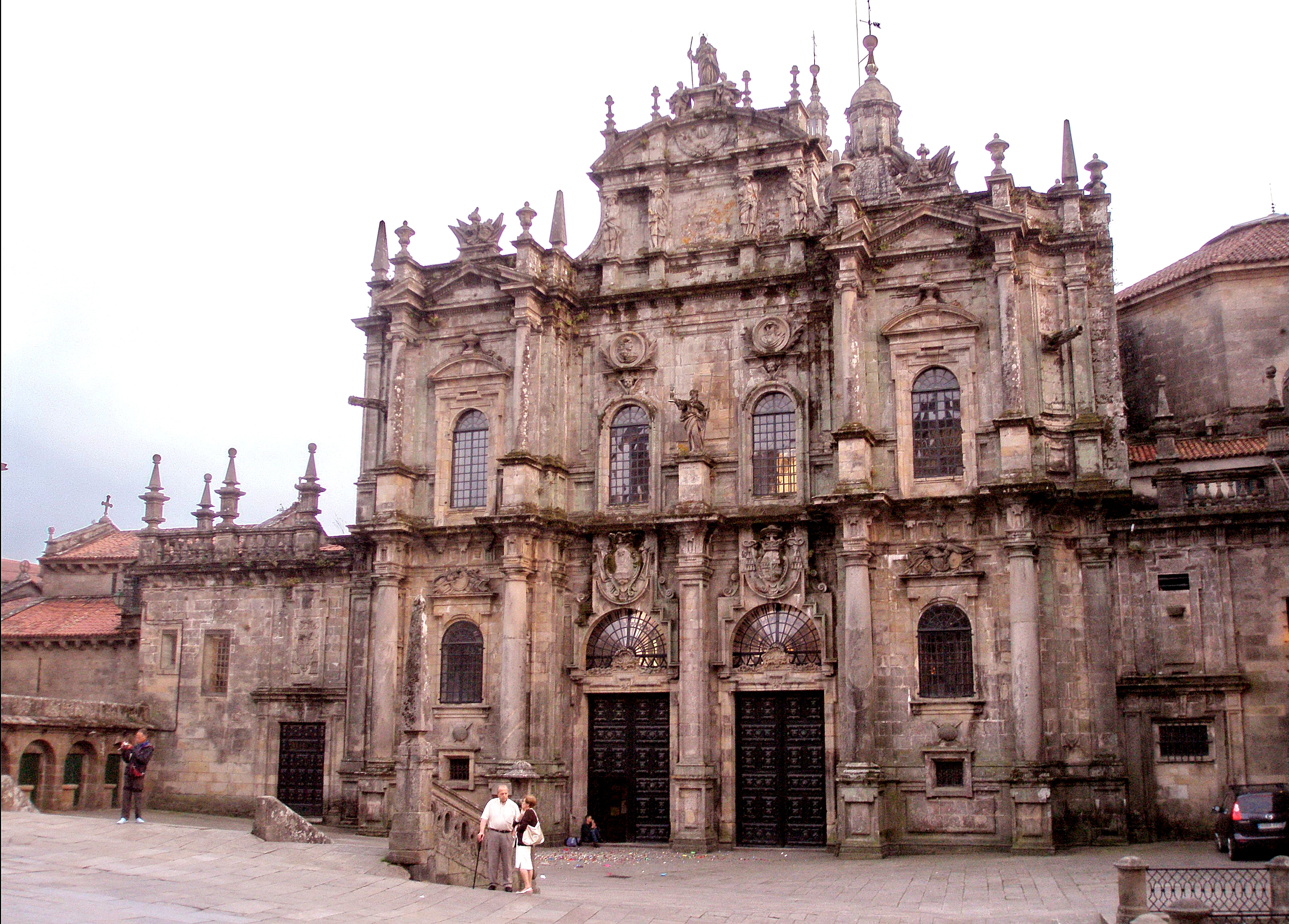 Puerta del Paraíso (puerta norte de la Catedral), da a la plaza de la Inmaculada o Azabachería y por ella entraban los peregrinos a la Catedral.